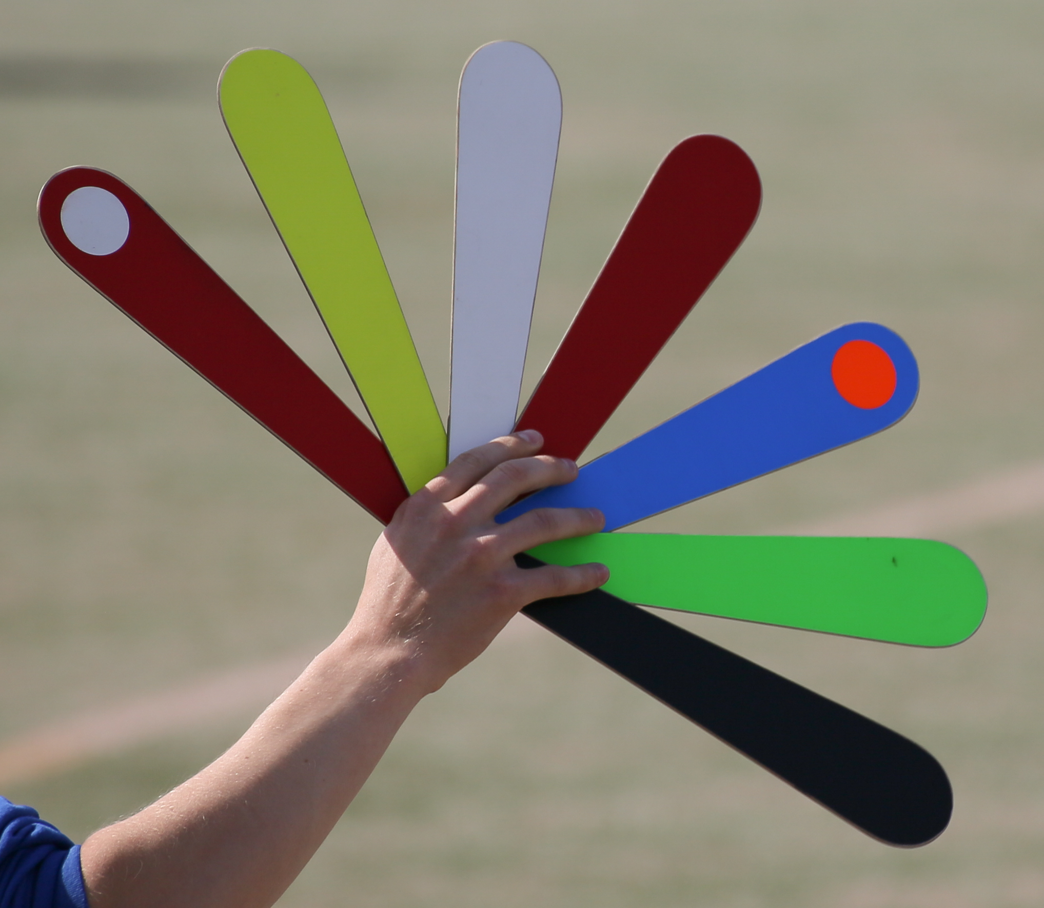 Pesäpallon merkkiviuhka.